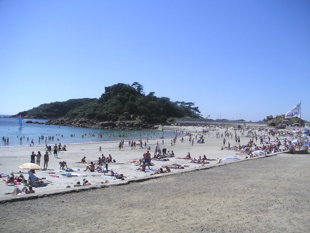 Der Strand von Trebeuden in der Nähe von Lannion.